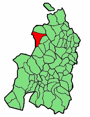 aipaturiko udalerriaren kokapena Nafarroa Beherean